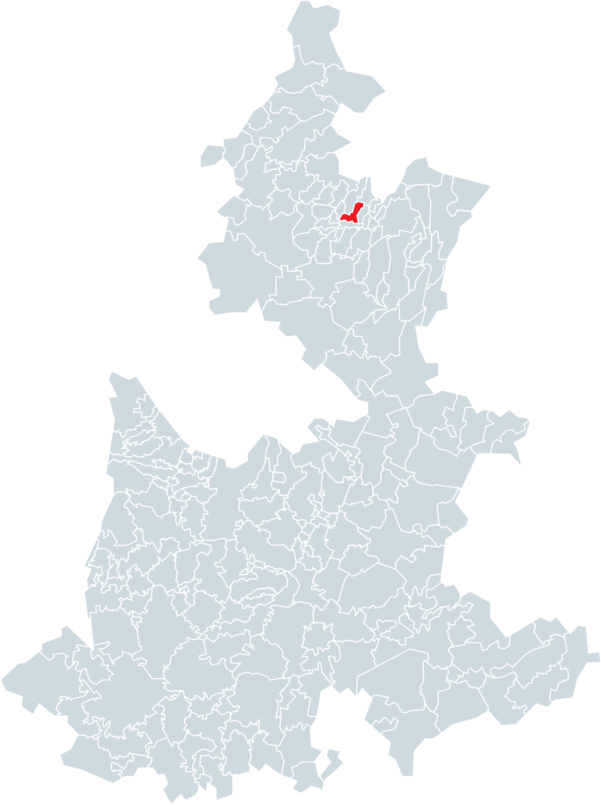 Municipio de Hueytlalpan